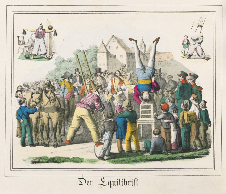 Der Equilibrist. Aus: Der Jahrmarkt, Sehenswürdigkeiten und Scenen in bunter Reihe. Ein Bilderbuch mit Text von Zweien. 18 Bl. Mit 18 kolorierten lithographischen Tafeln von Friedrich Bernhard Elias nach Zeichnungen von Johann Friedrich Schlotterbeck. 21 x 26,5 cm. J. F. Schreiber, Esslingen [1843].